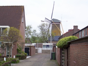 Katwijk aan den Rijn , Korenmolen De Geregtigheid